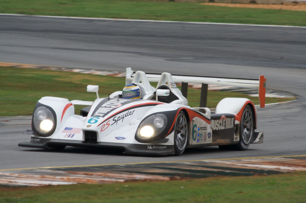 Klaus Graf driving a Porsche RS Spyder at Petit Le Mans 2009